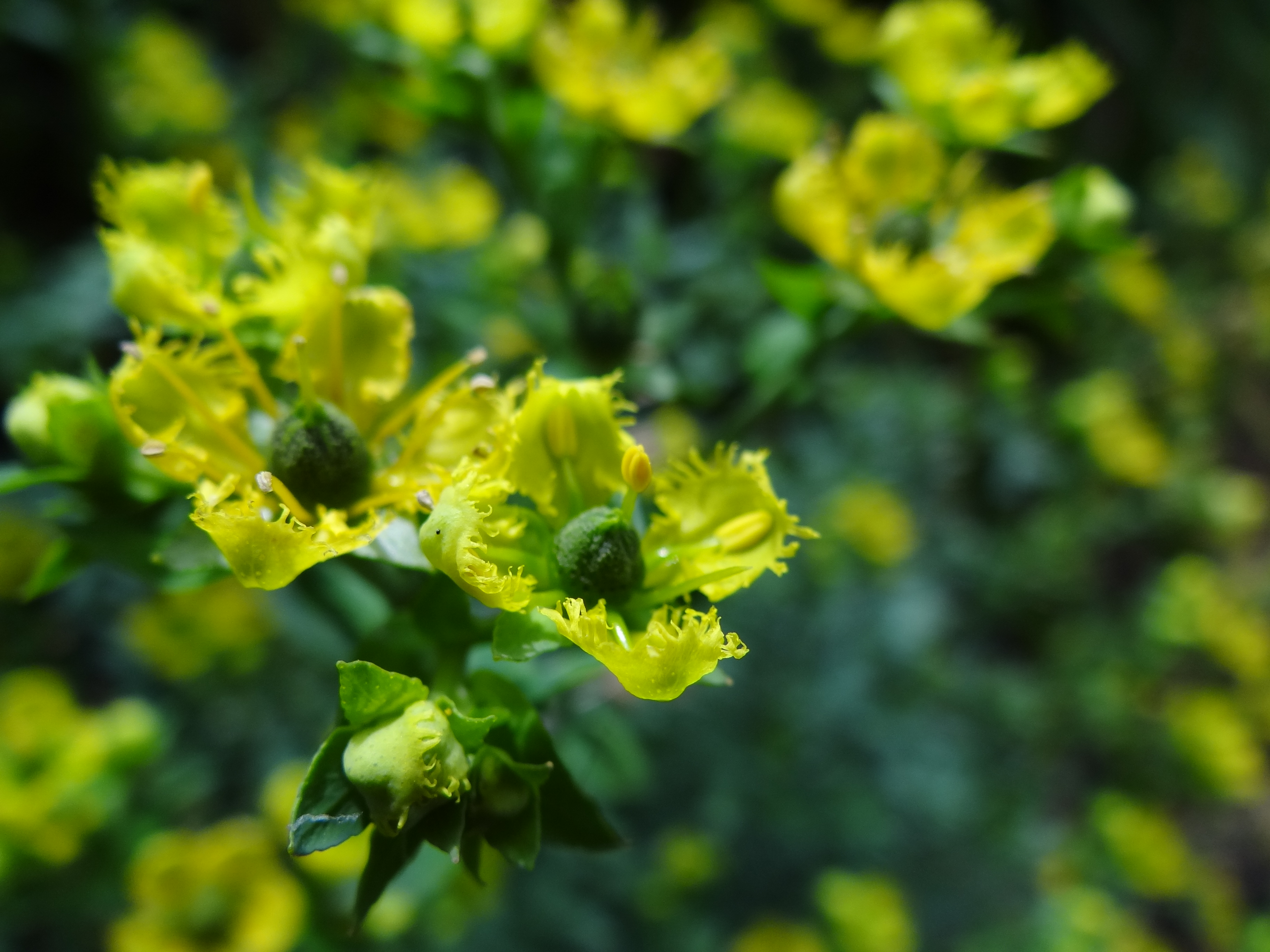 Flores de ruda,Ruta chapelensis